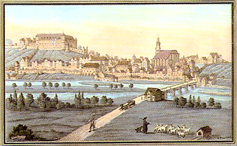 Tübingen im 16. Jahrhundert (kolorierte Federzeichnung 18,1 x 31,5 cm, Träger 27,6 x 41 cm); ohne Schefold-Nummer